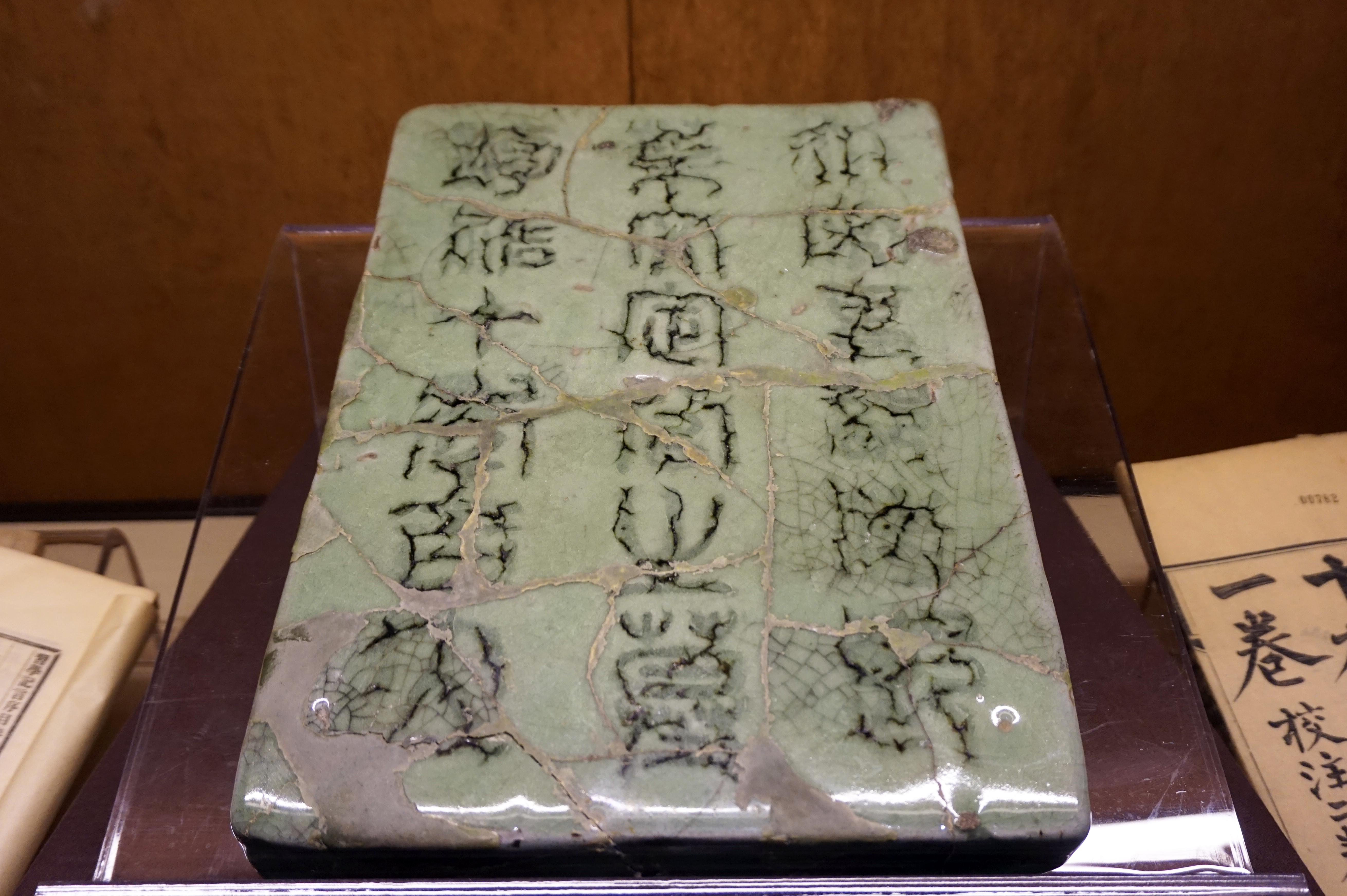 南宋淳祐十年（1250年）龙泉窑青瓷墓志。1940年鹿城区慈山叶适墓出土。“大宋吏部侍郎，叶文定公之墓，淳佑十年吉立。”